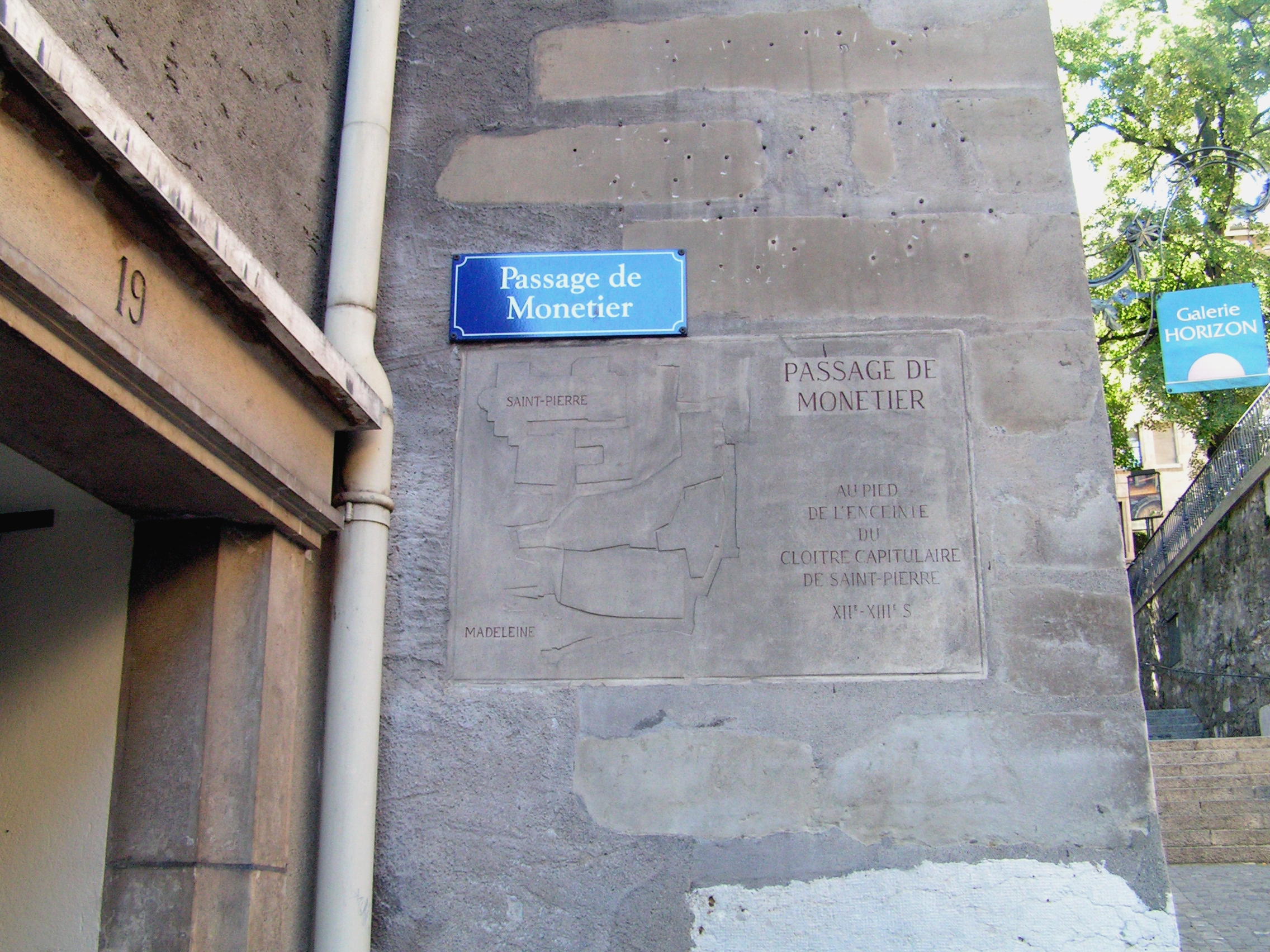 Vieille-ville, Genève. L'un des accès au passage de Monetier.